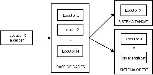 Diagrama de decisió d'un reconeixedor de locutors segons utilitzi un sistema obert o tancat.